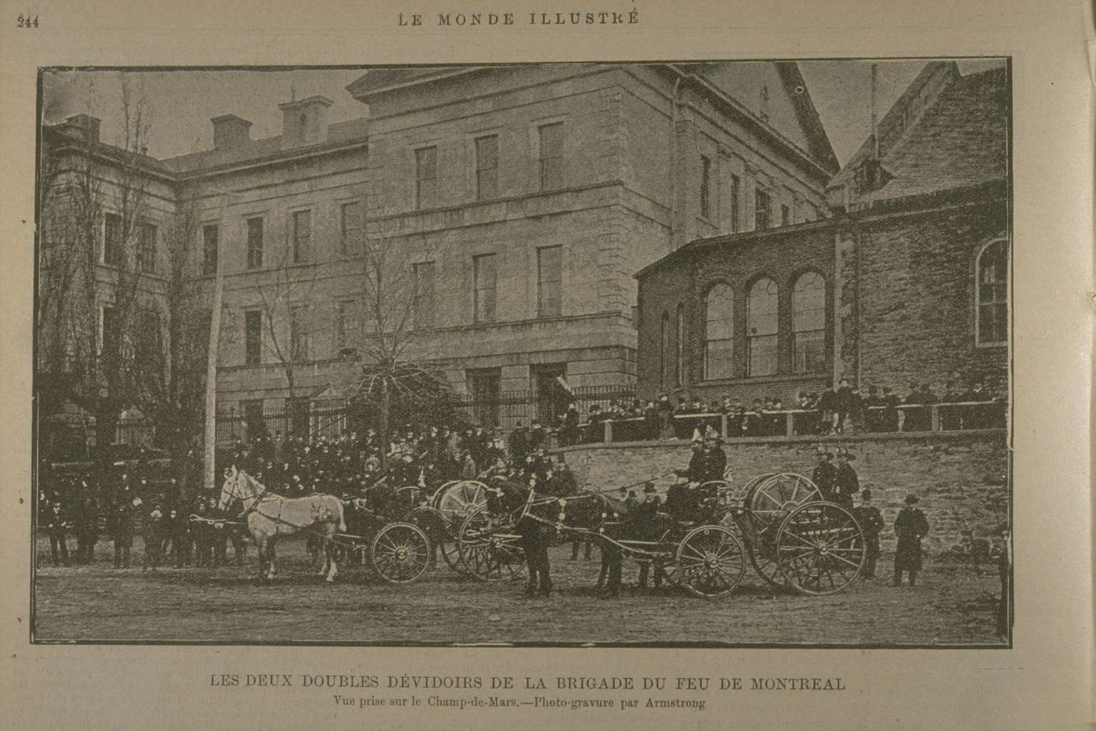 Les deux doubles dévidoirs de la brigade du feu de Montréal : Vue prise sur le Champ-de-Mars, Le Monde illustré, vol. 6 no 291. p. 244 (30 novembre 1889)